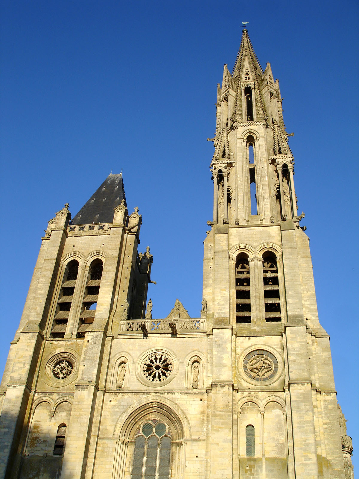 Façade occidentale de la cathédrale Notre-Dame de Senlis, Oise, France.